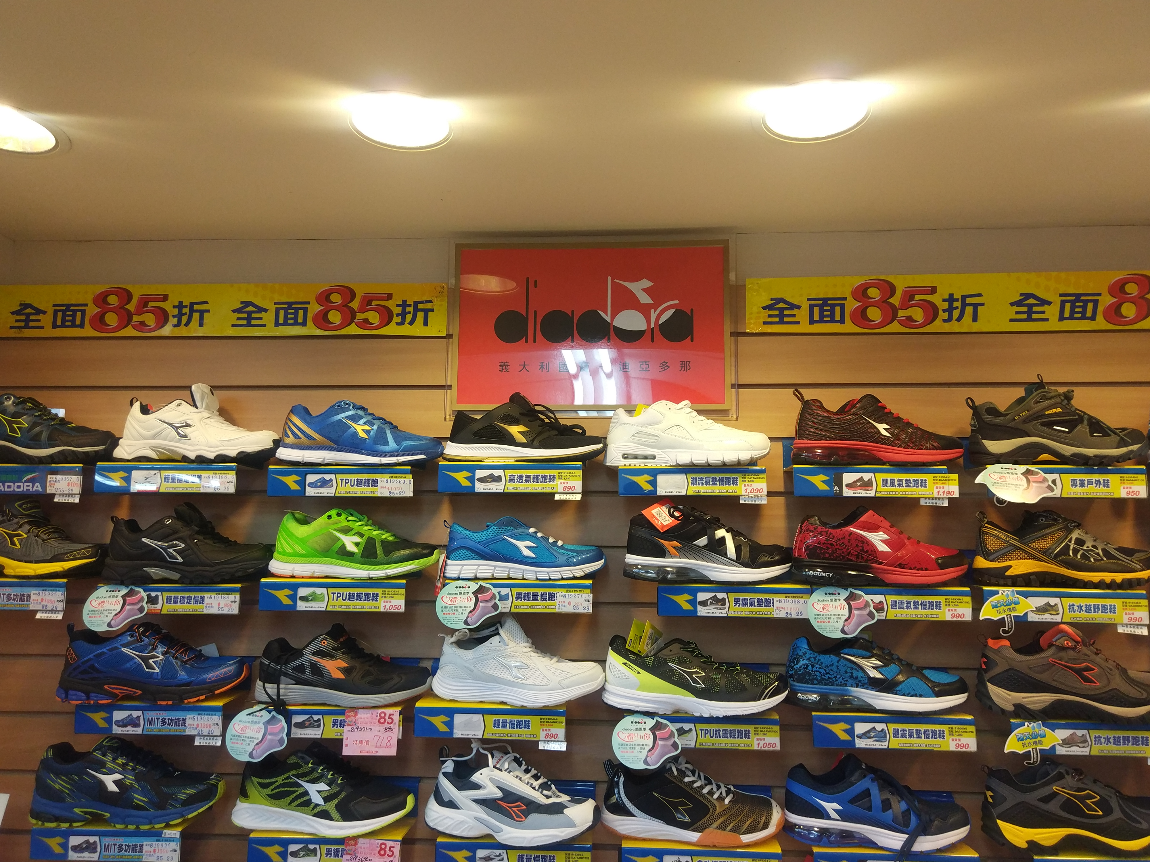 鞋全家福某門市的diadora運動鞋展示架